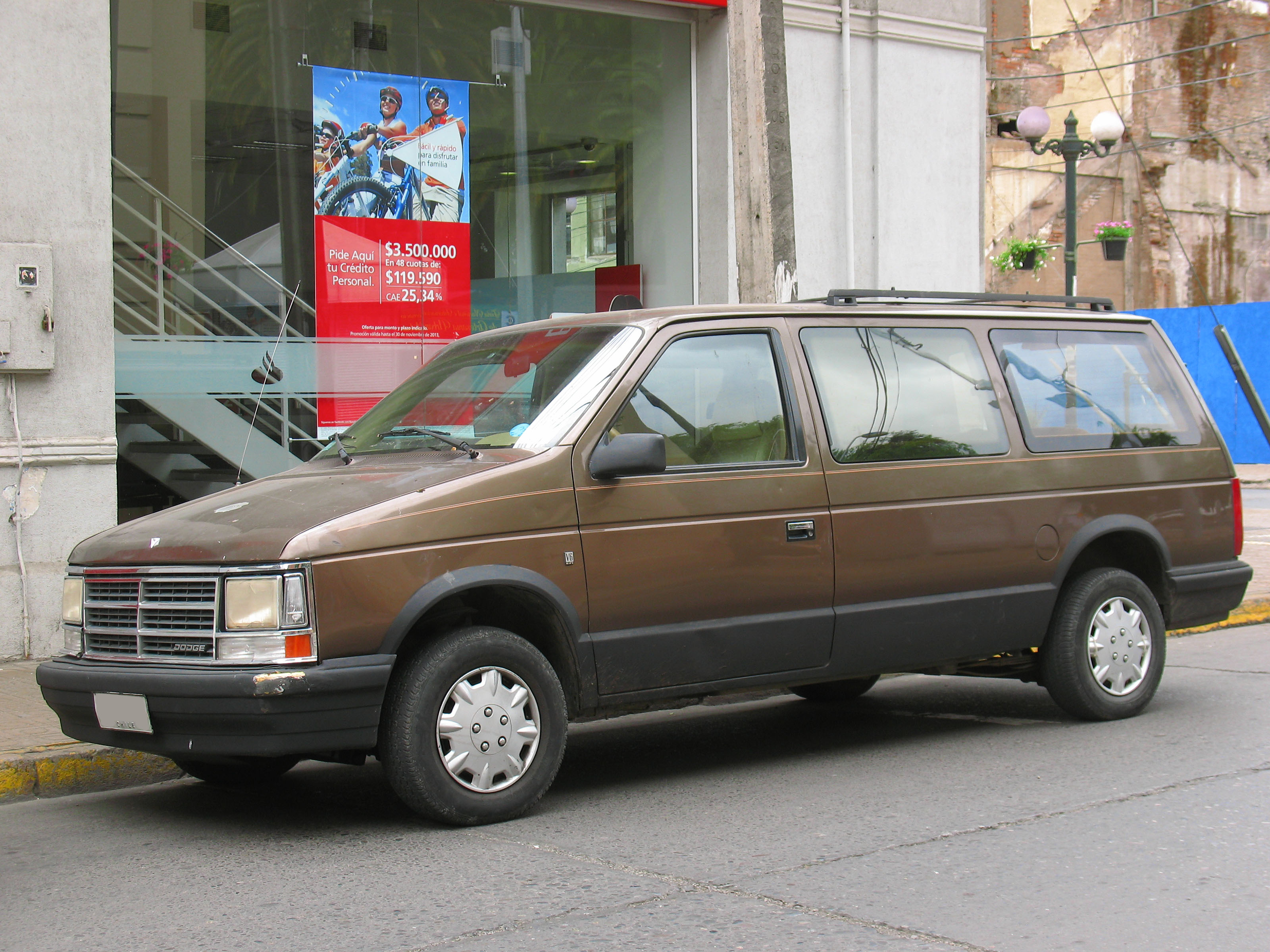 Dodge Grand Caravan V6 LE 1989